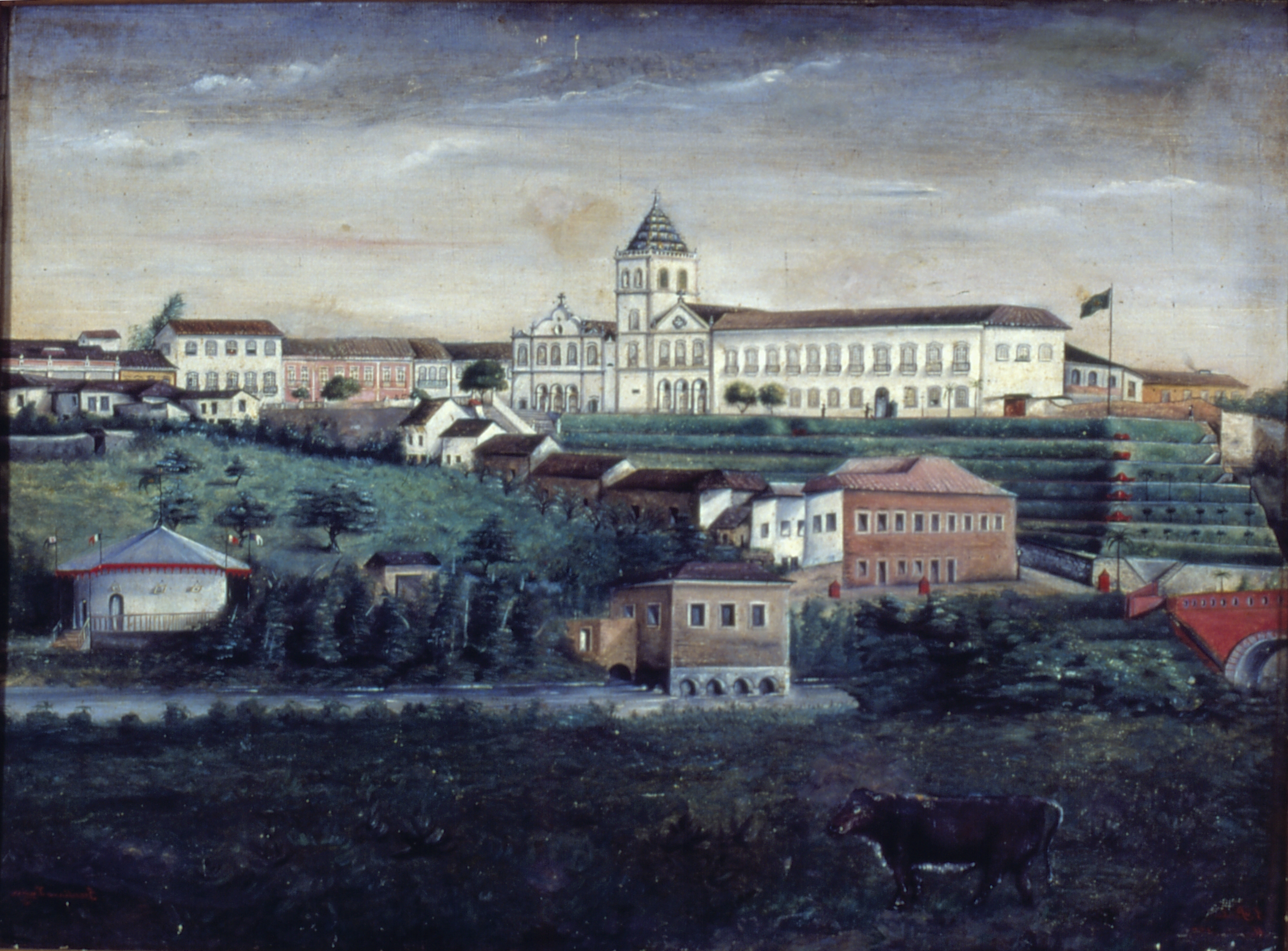 Obra que integra o acervo do Museu Paulista da USP.